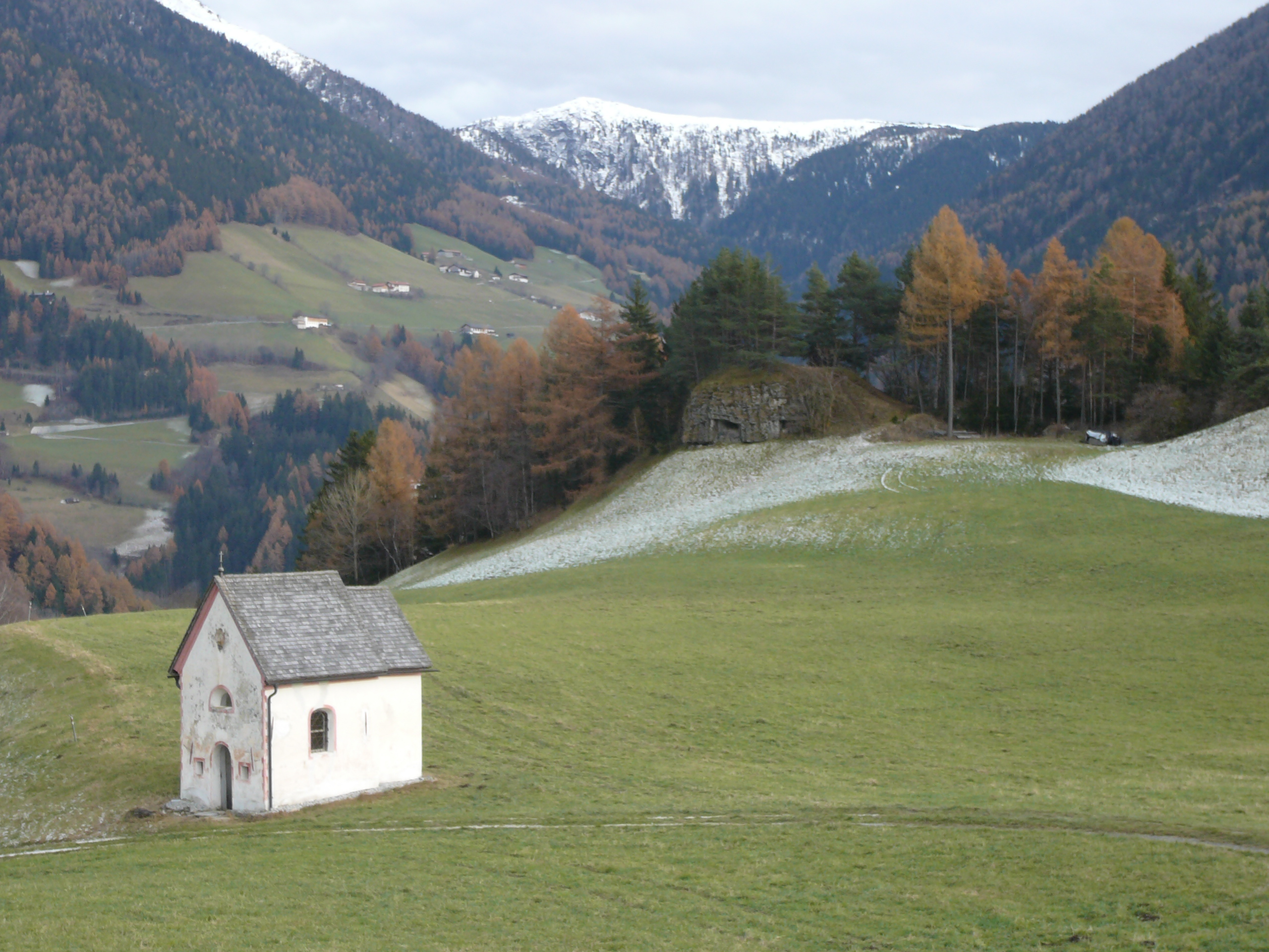 Opera 12 mules